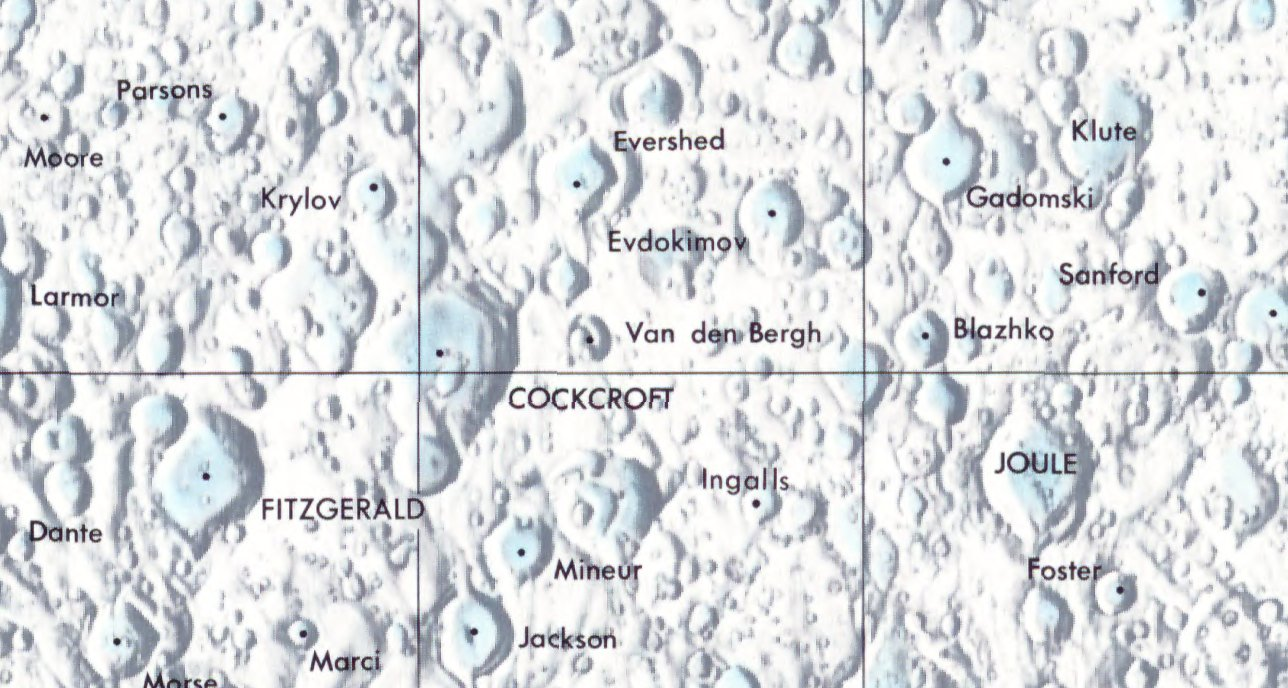 Cráter lunar Van den Bergh. Localización. (Lunar Chart LPC1. Second Edition)